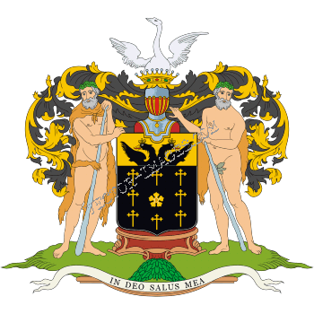 Герб рода графа Бестужева-Рюмина